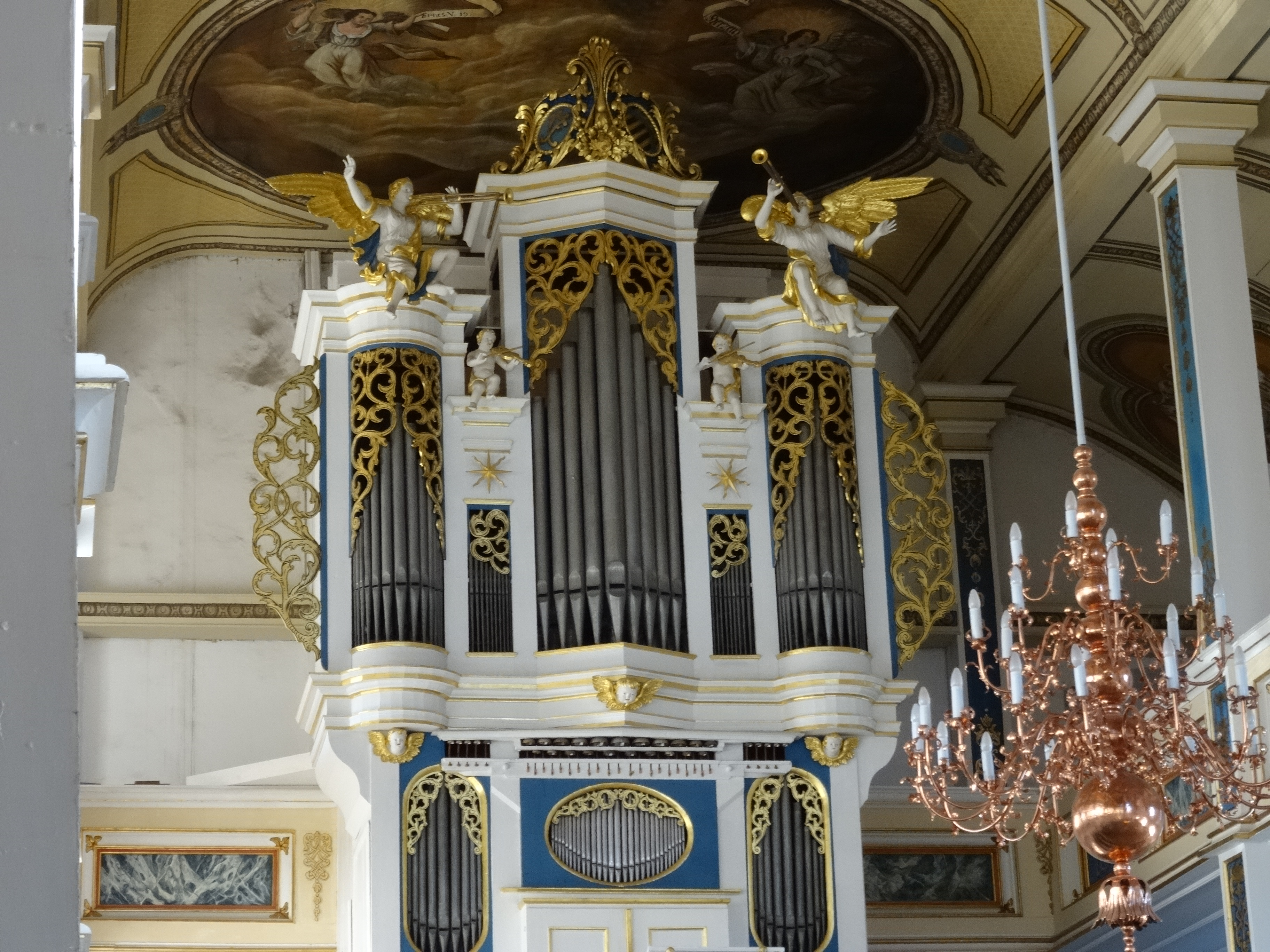 Die Thielemann-Orgel von 1731 der St.-Trinitatis-Kirche Gräfenhain zählt zu den bedeutendsten Barockwerken der Bachzeit in Thüringen. 1993 bis 1996 durch Orgelbau Waltershausen restauriert. Die zwei Wappenschilder oben zeigen Herzog Friedrich II. von Sachsen-Gotha-Altenburg und das herzoglich-sächsische Wappen.